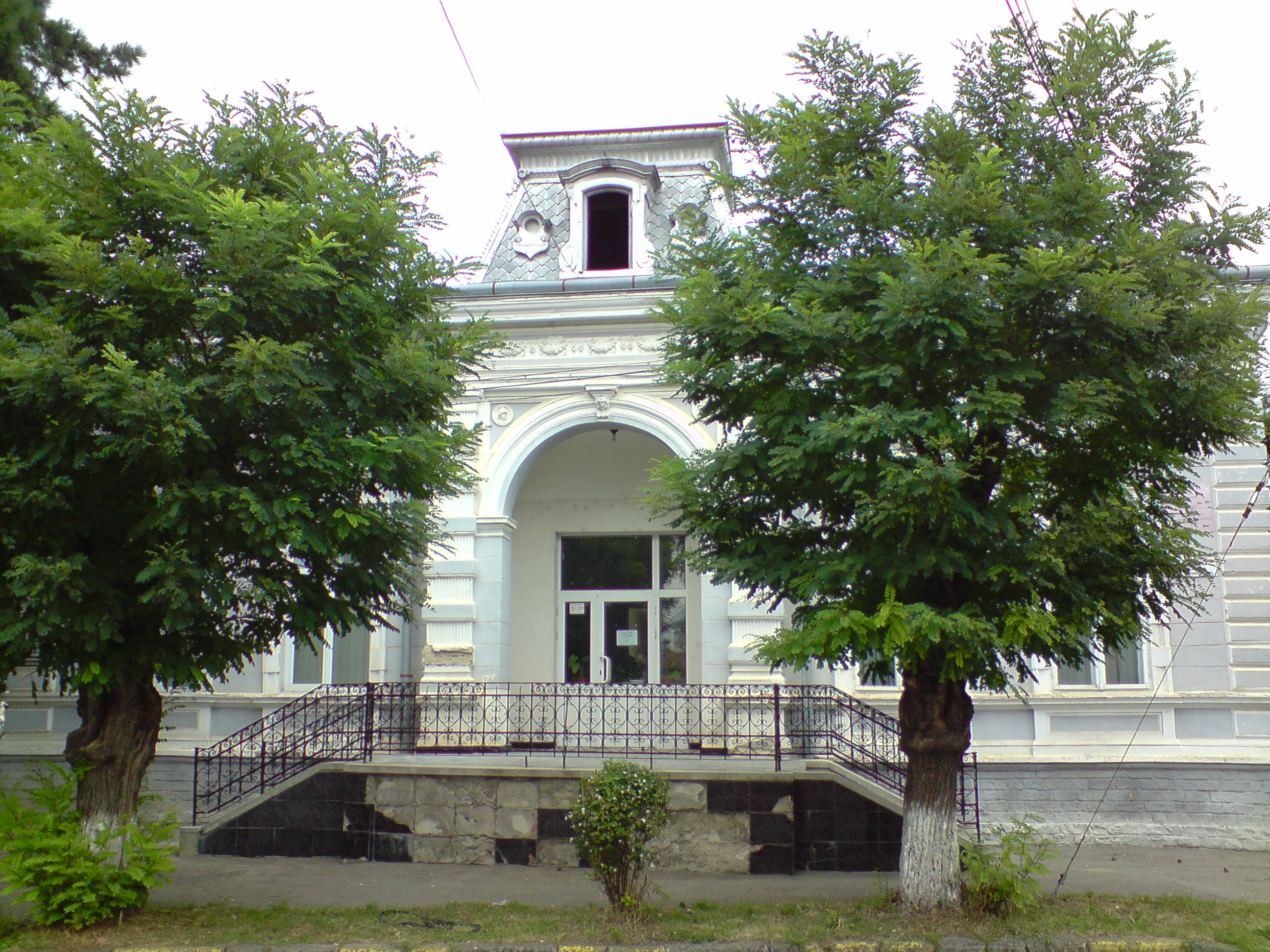 Camera de comert - sediul vechi